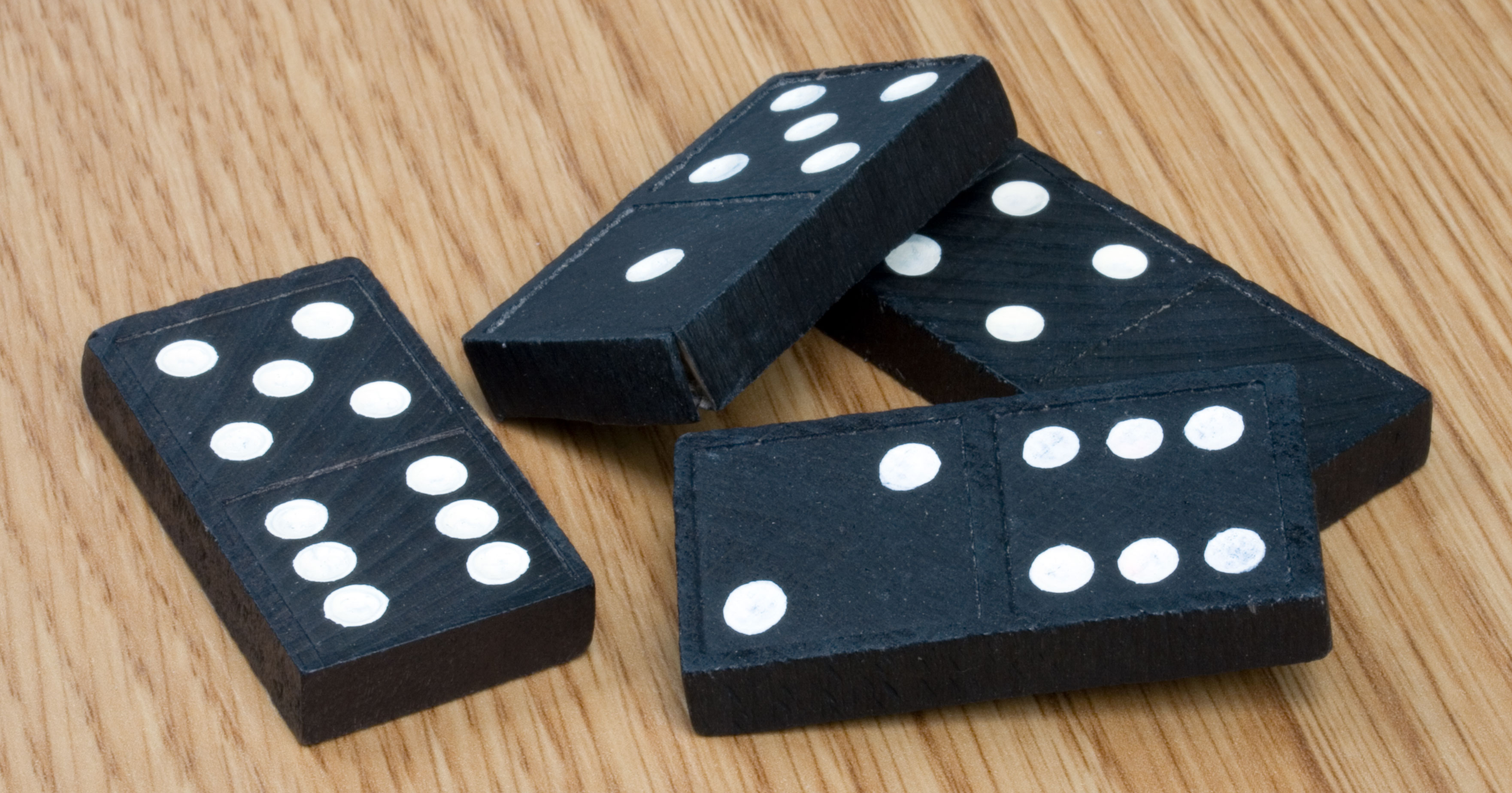 Sujet:Dominosteng Source:Eege Foto vum User:Cornischong